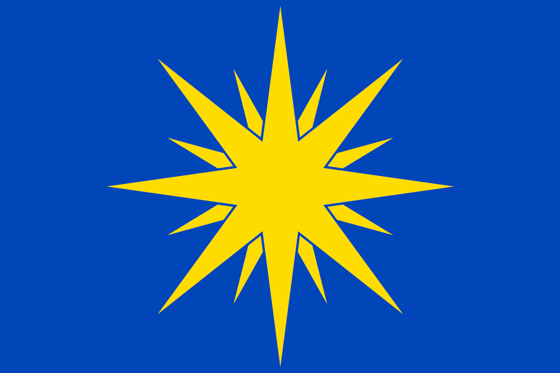 Vlajka Dědic (Dědice: neoficiální vlajka).